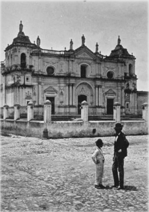 Iglesia de Santo Domingo de la Ciudad de Guatemala en 1875.